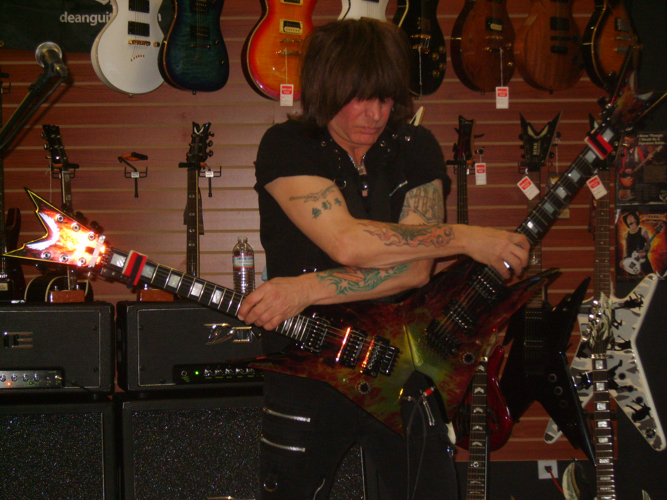 see title